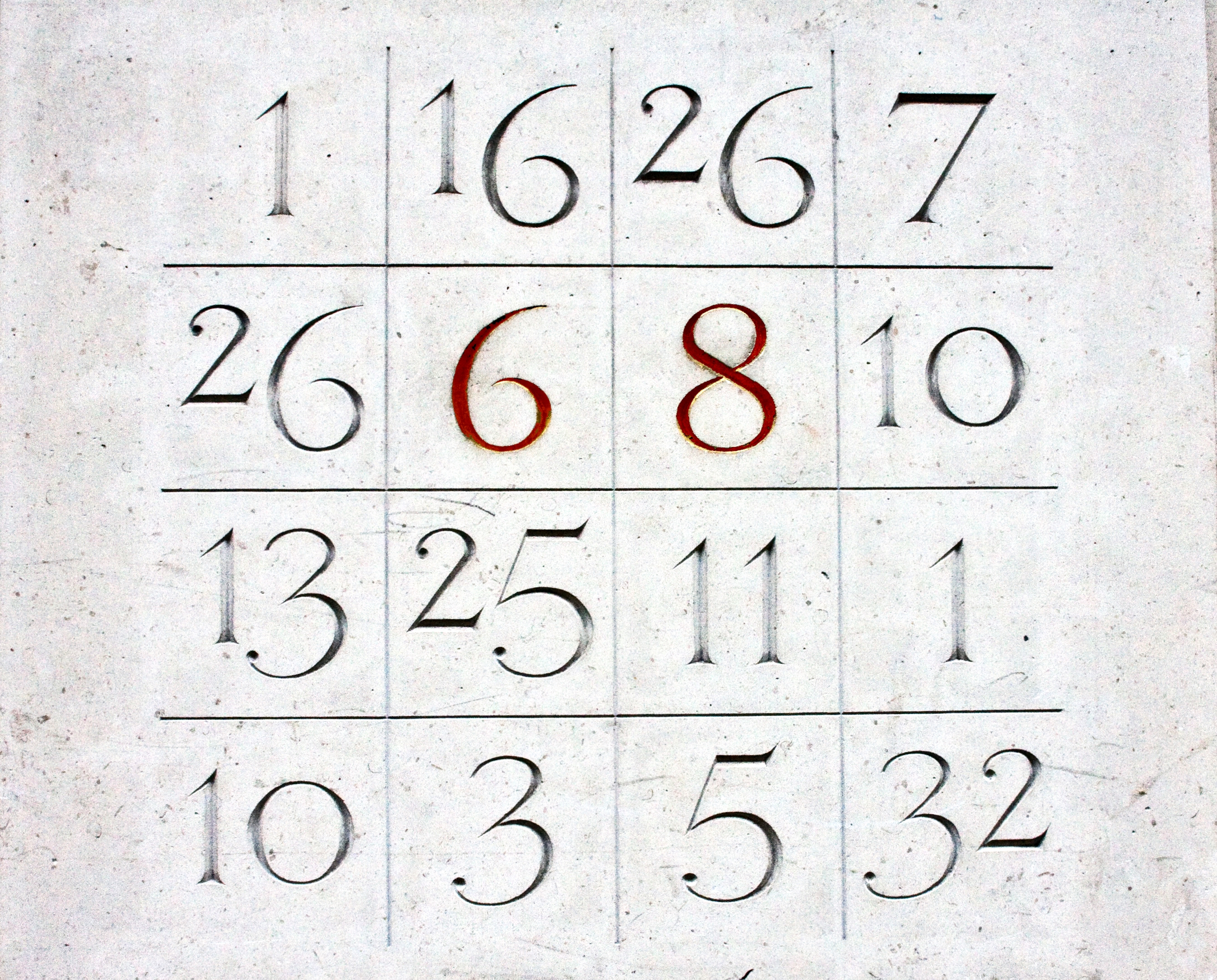 Rue d'Auteuil (Paris). Cette plaque de numéro de rue forme un carré magique (la somme des chiffres des lignes, des colonnes et des deux diagonales font 50)